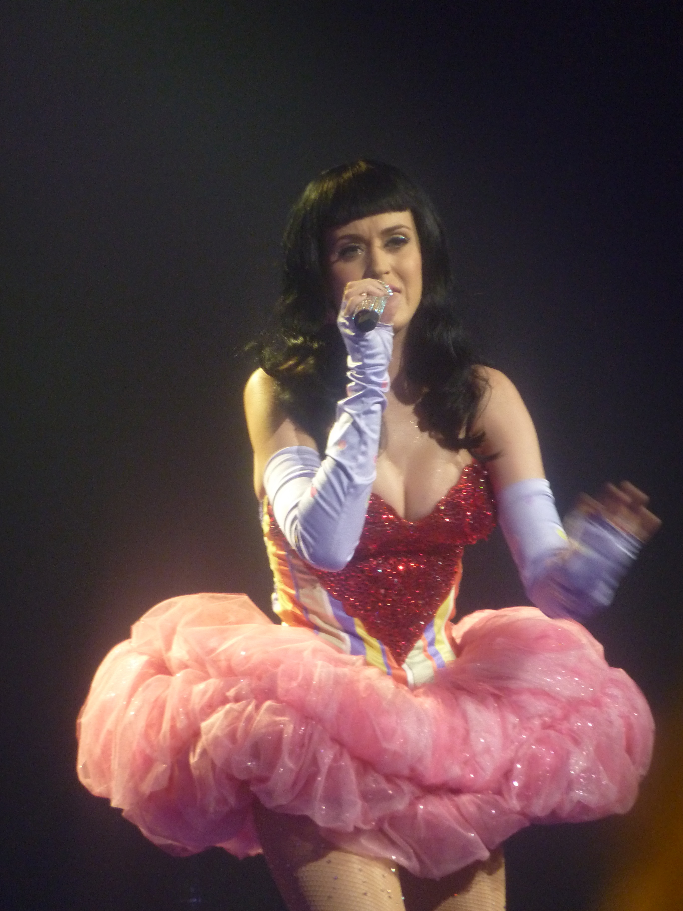 Katy Perry en concert le 08 mars 2011 au Zenith de Paris dans le cadre de sa tournée " California Dreams Tour ".